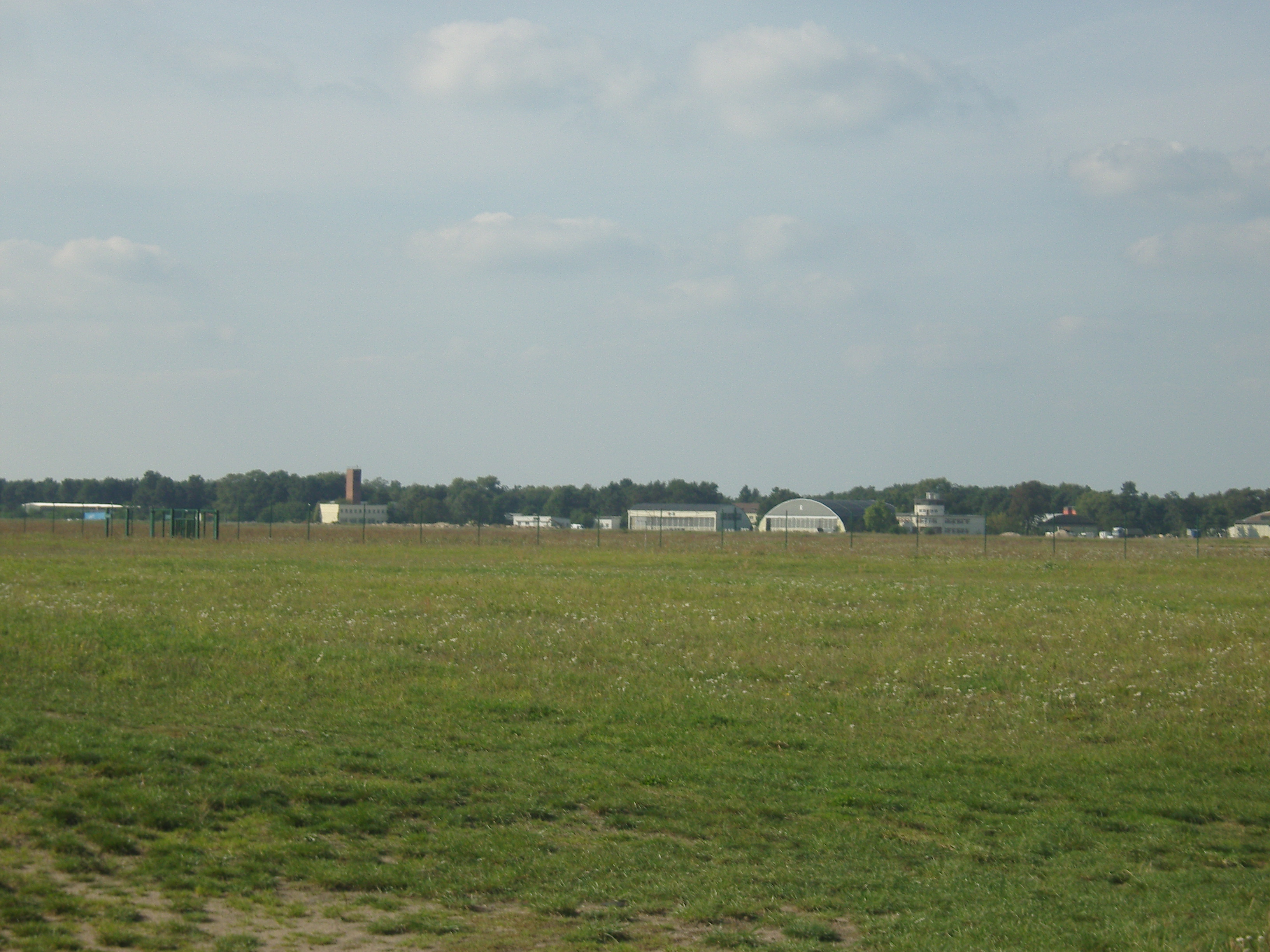 Flugplatz Cottbus-Nord, denkmalgeschützt